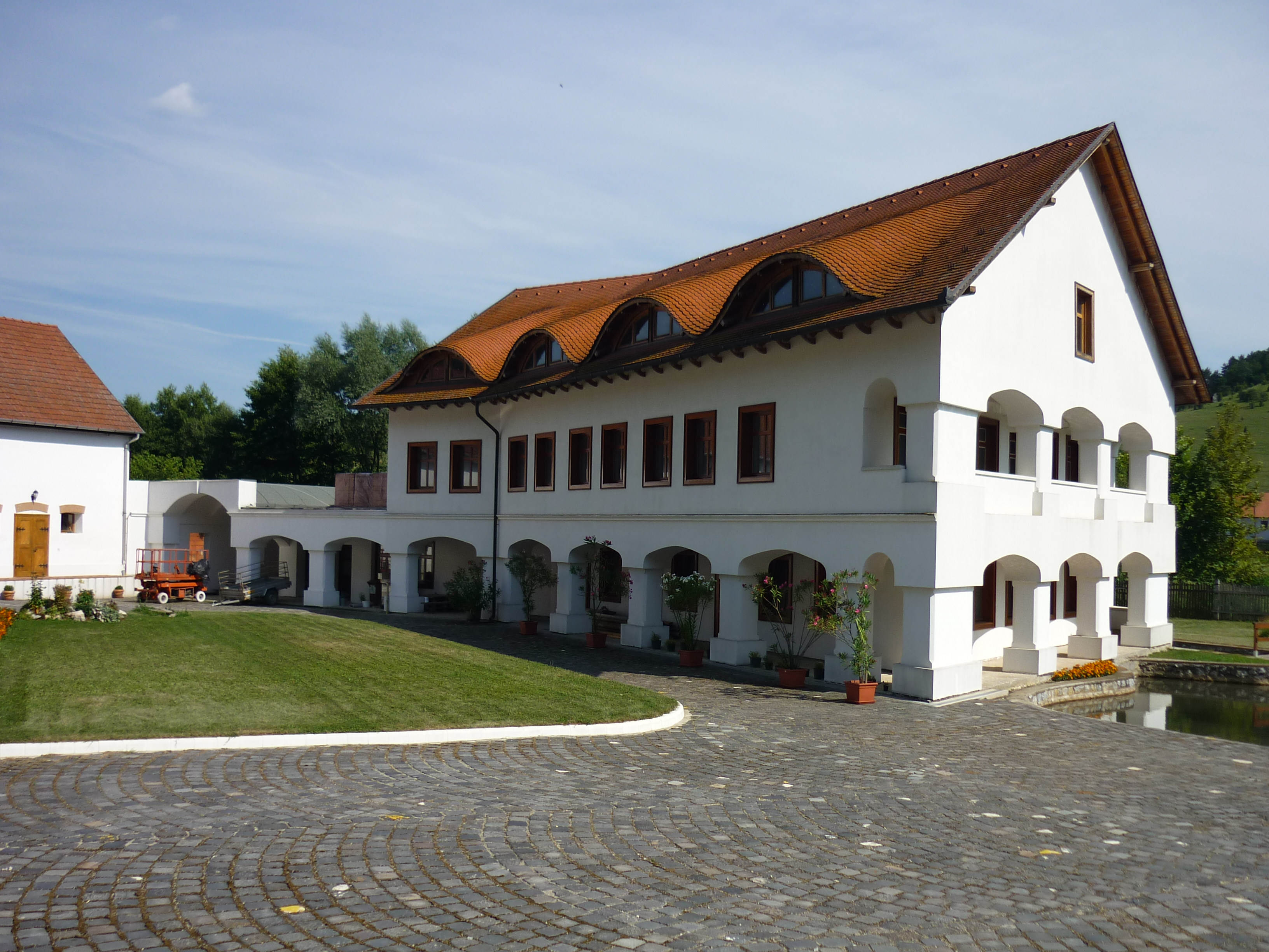 A felújított malomház Szinpetriben